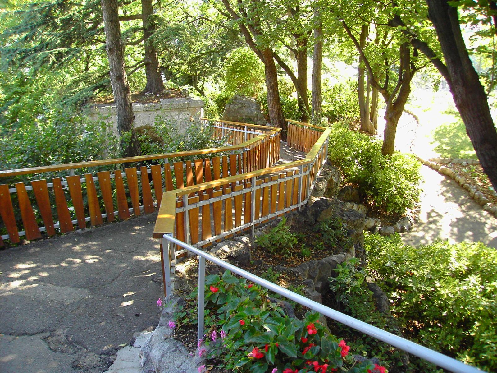 Jardin des Dauphins - Grenoble